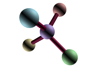 Tetraederlücke